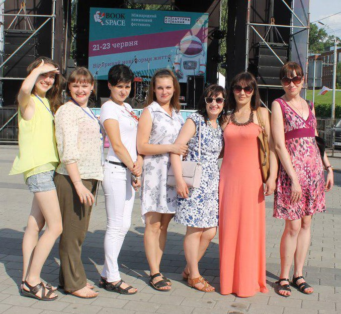 Марія Дружко раом з друзями на Book Space 2019 у Дніпрі